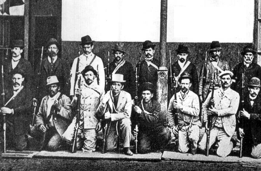 Revolucionários radicais na cidade de Rosario, em 1893. Fonte: Archivo General de la Nación Argentina. Esta imagem é de domínio público pela Lei nº 11.723 (lei argentina de propriedade intelectual), em seu artigo 34 e suas modificações; todas as obras fotográficas produzidas na Argentina passan ao domínio público após decorridos 25 anos desde a sua primeira publicação.